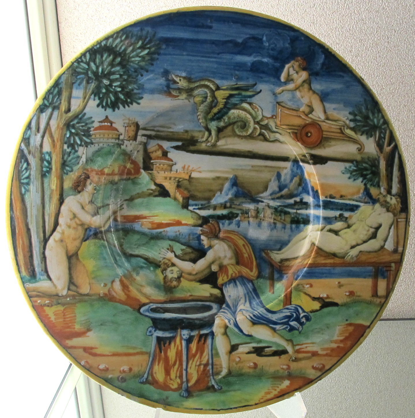 Museo Nazionale d'Arte Medievale e Moderna - MIBAC This is a photo of a monument which is part of cultural heritage of Italy.